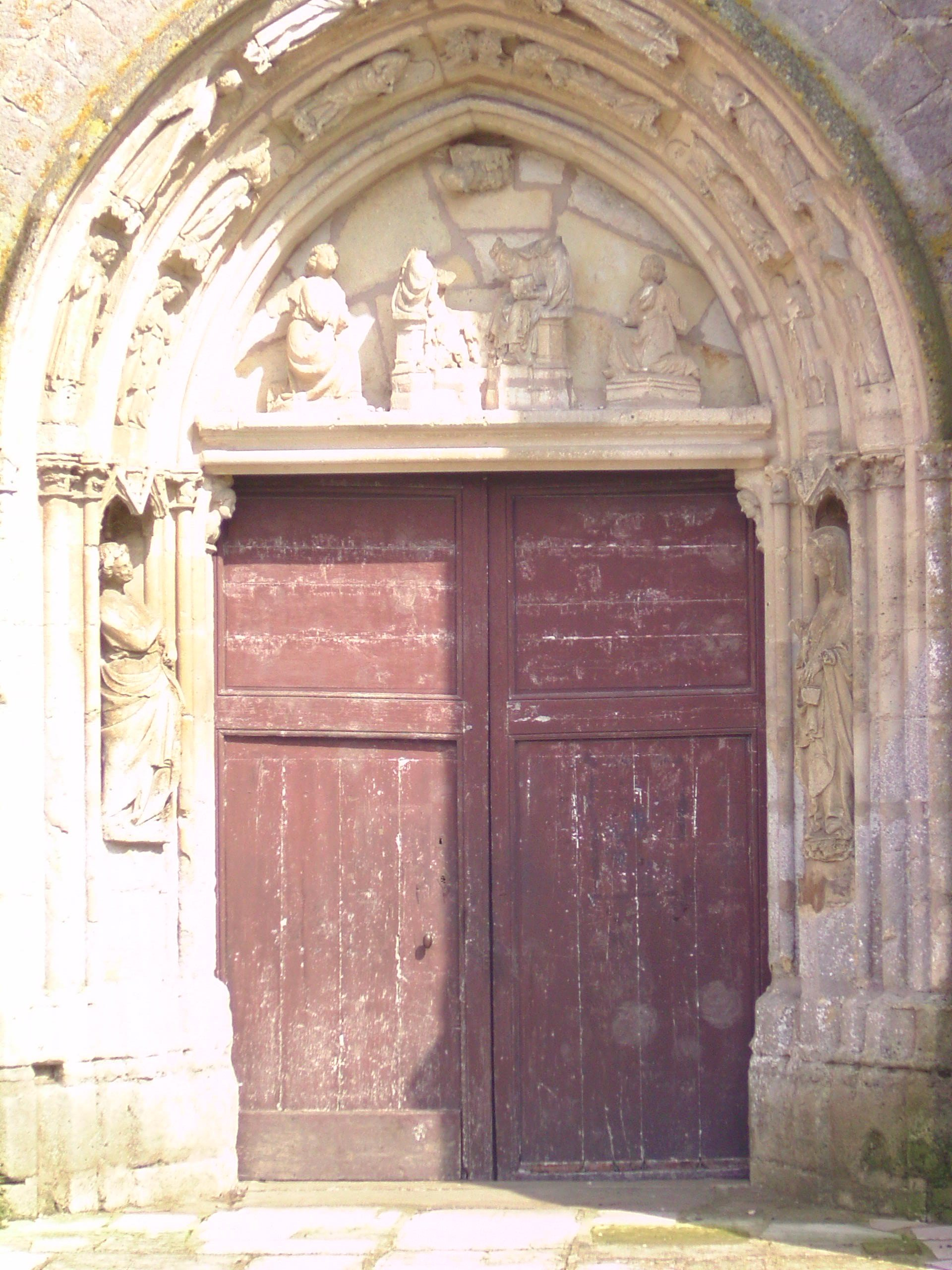 Eglise de Dixmont (Yonne - France)